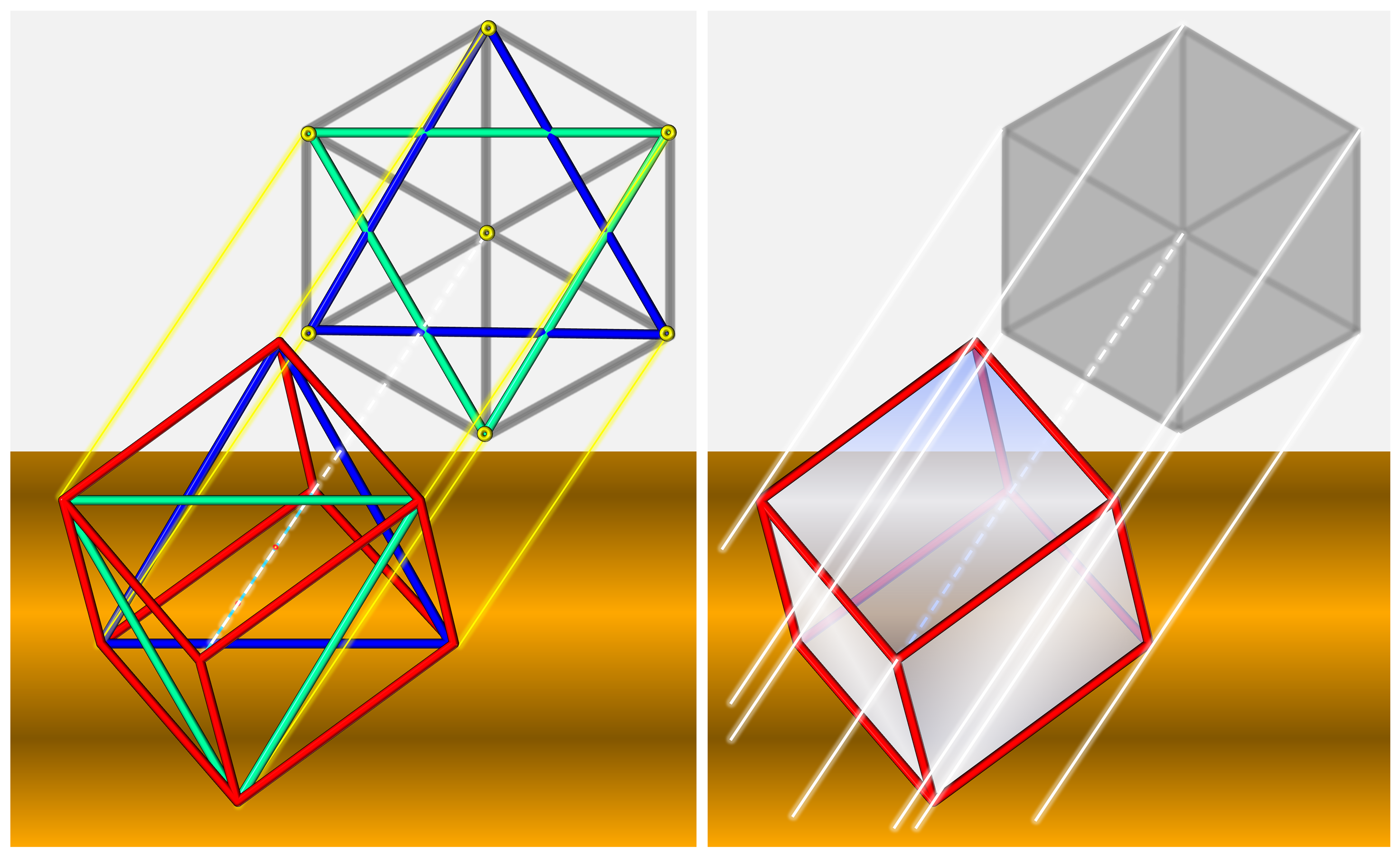 Le proiezioni ortoassiali delle sezioni ortoassiali del cubo sono due triangoli equilateri concentrici. Il loro inviluppo esterno costituisce l'ombra ortoassiale del cubo 3D, rappresentata da un esagono regolare.